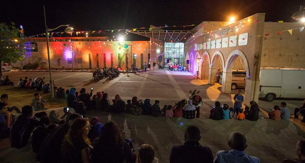 חגיגות במתנס המרכזי ברהט